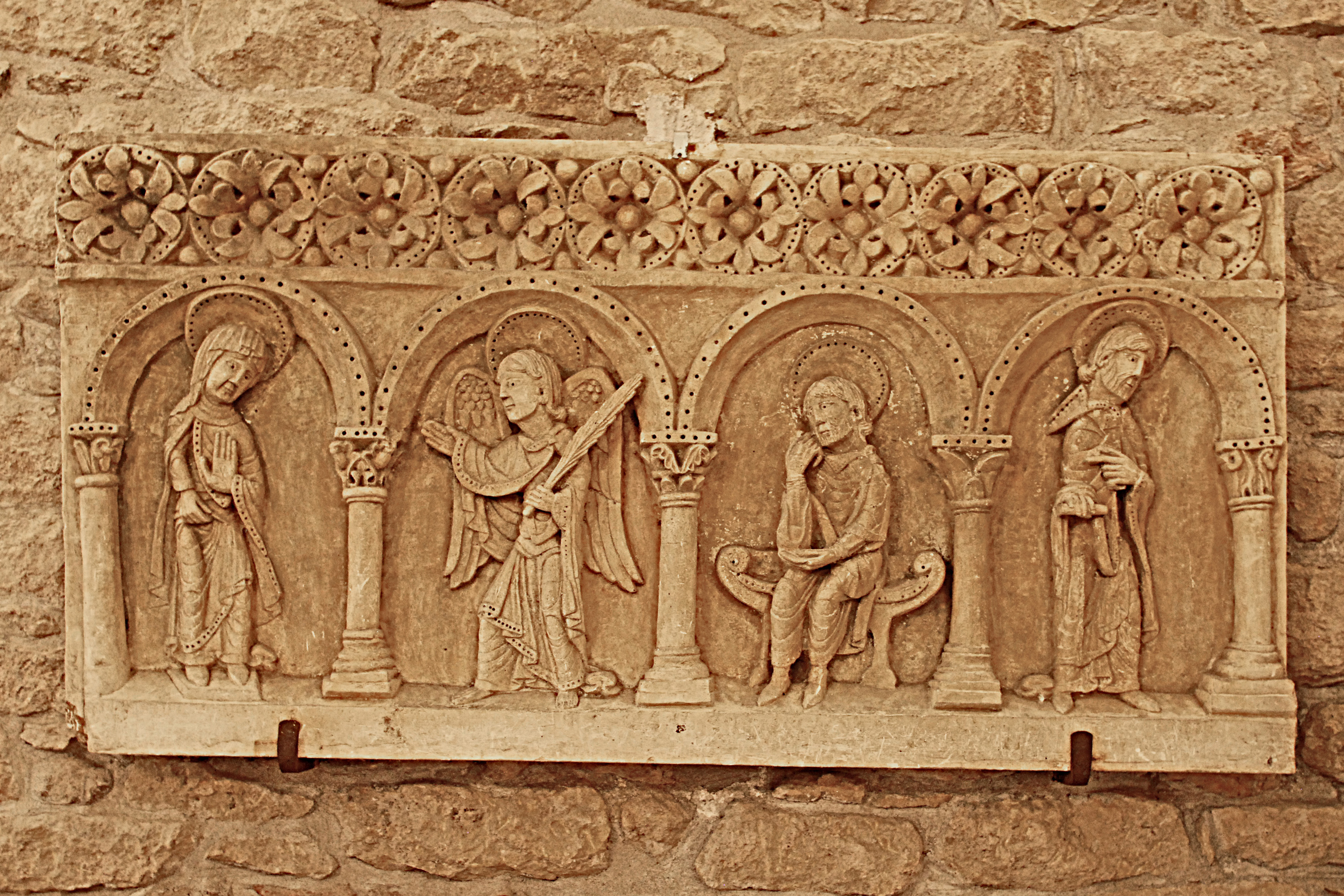 Lapidarium, Arkatur, Engel u. Heilige